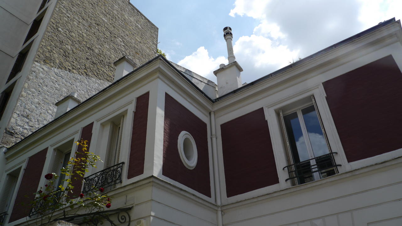 L'étage de la maison où l'acteur Patrick Dewaere a mis fin à ses jours, impasse du Moulin-Vert à Paris, 14e.